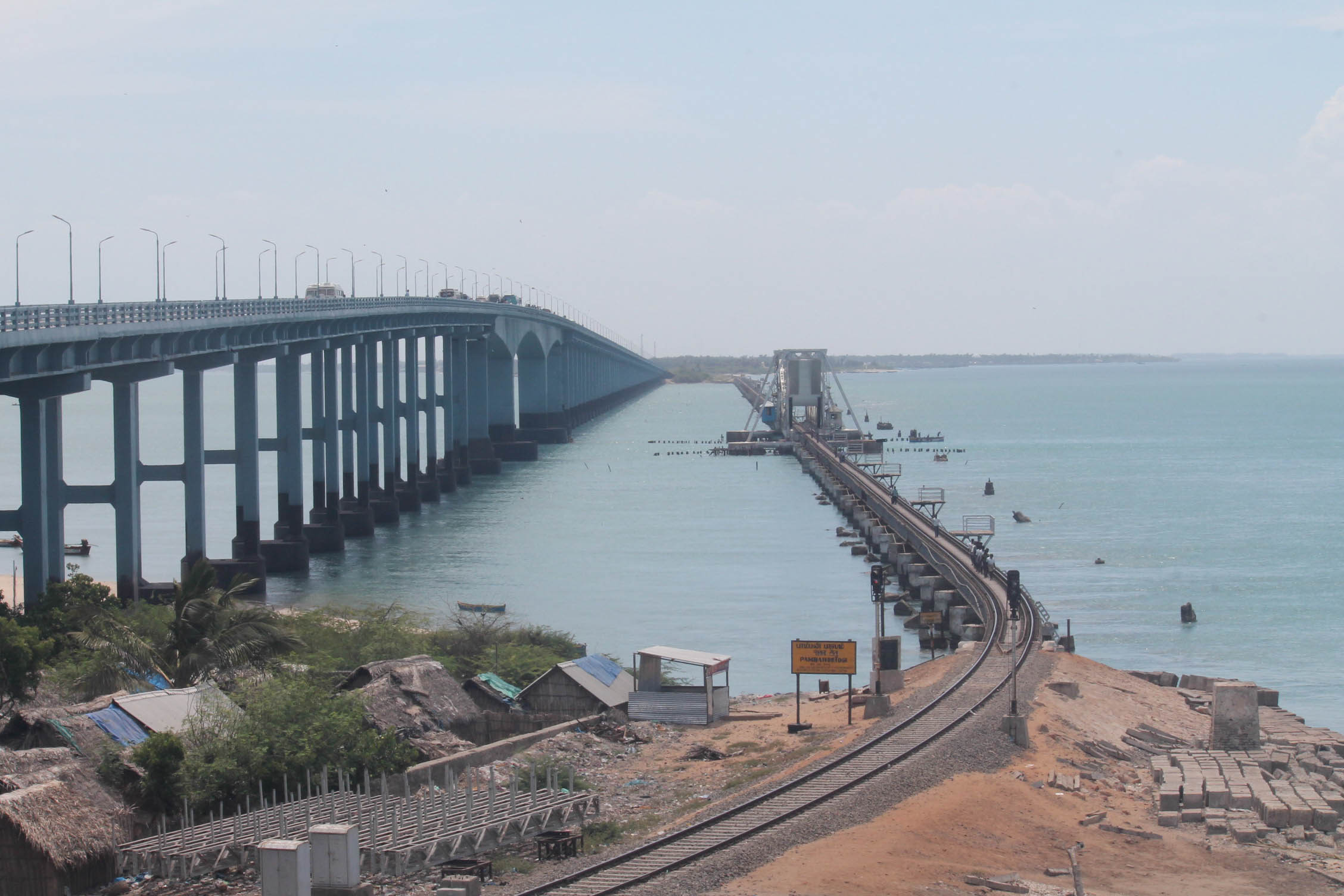 രാമേശ്വരത്തെ റെയിൽ പാളവും റോഡ് പാലവും